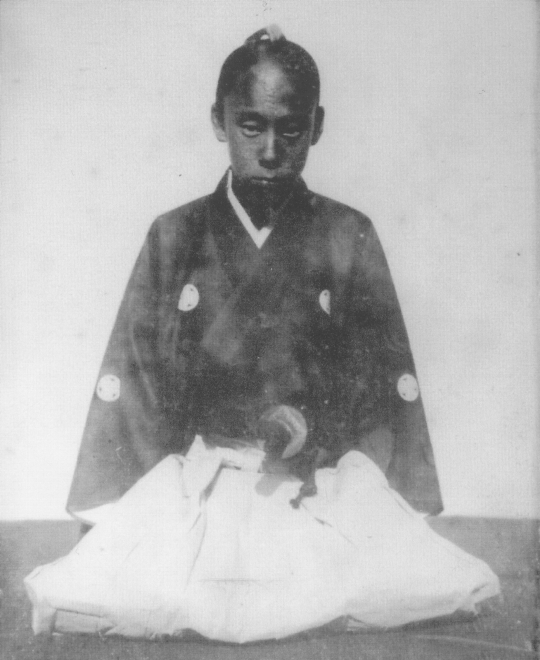 松平定敬。Matudaira Sadaaki.湿板写真。